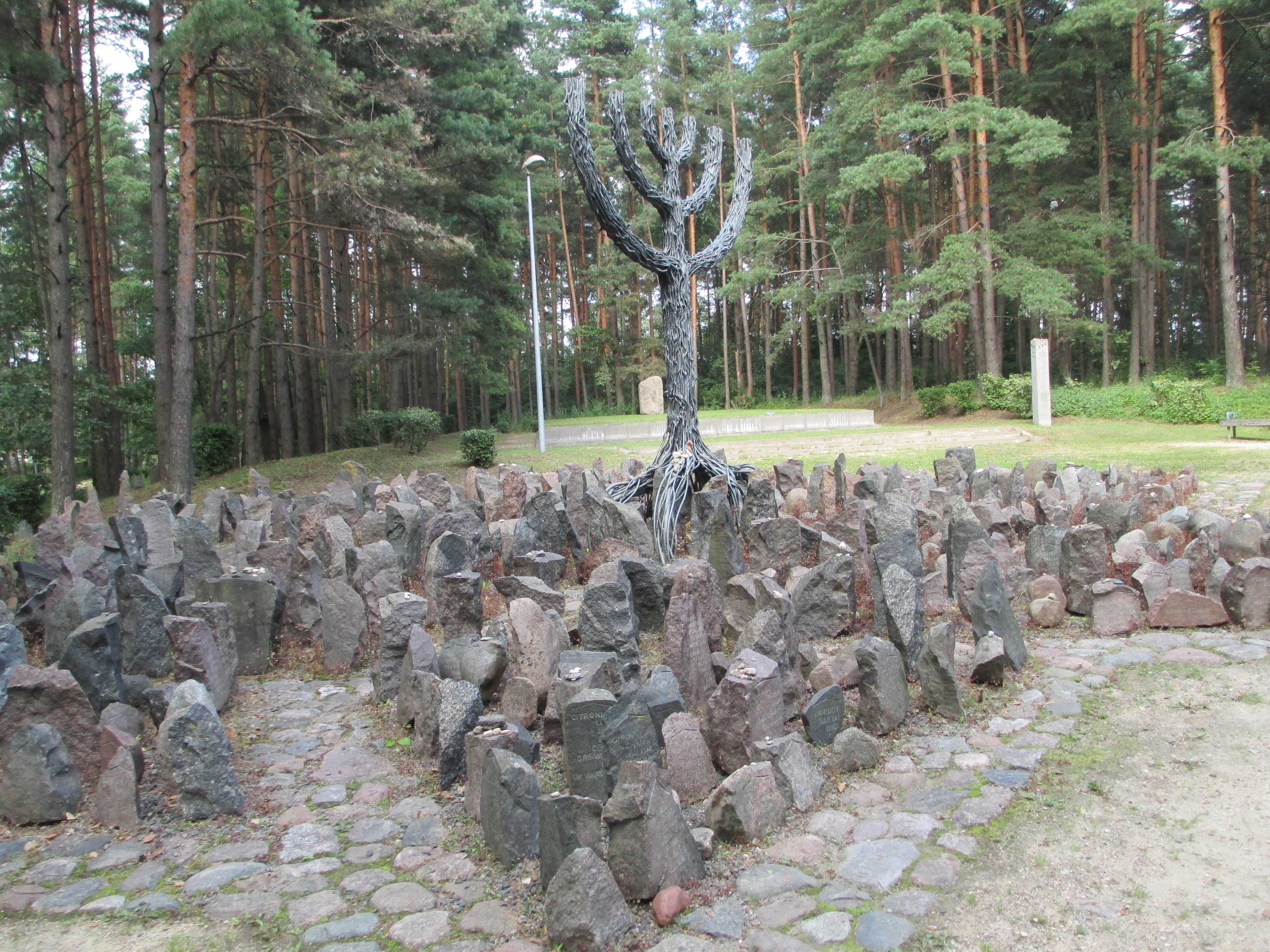 אתר ההנצחה ביער רומבולה